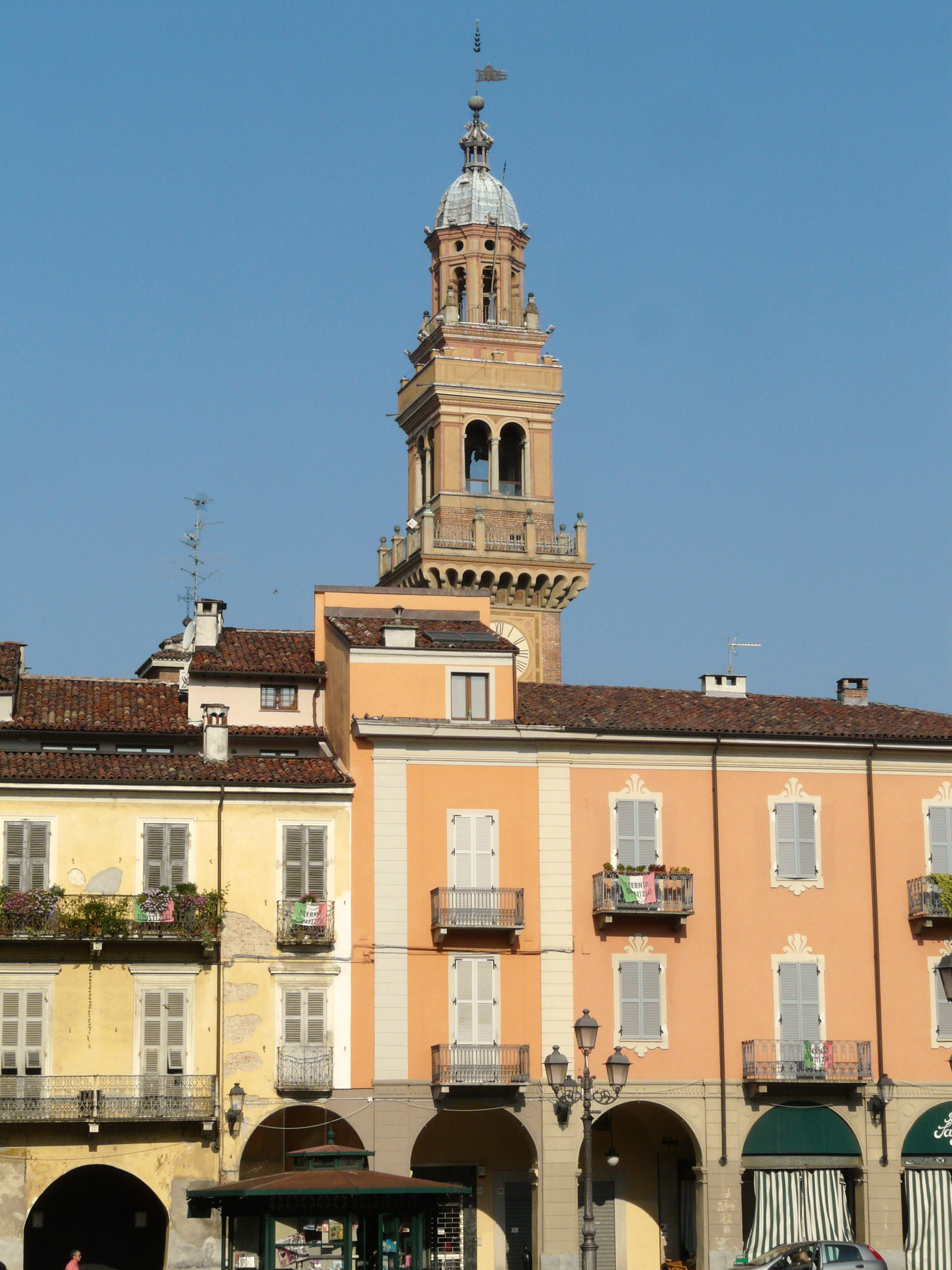 Torre Civica, Casale Monferrato, Piemonte, Italia